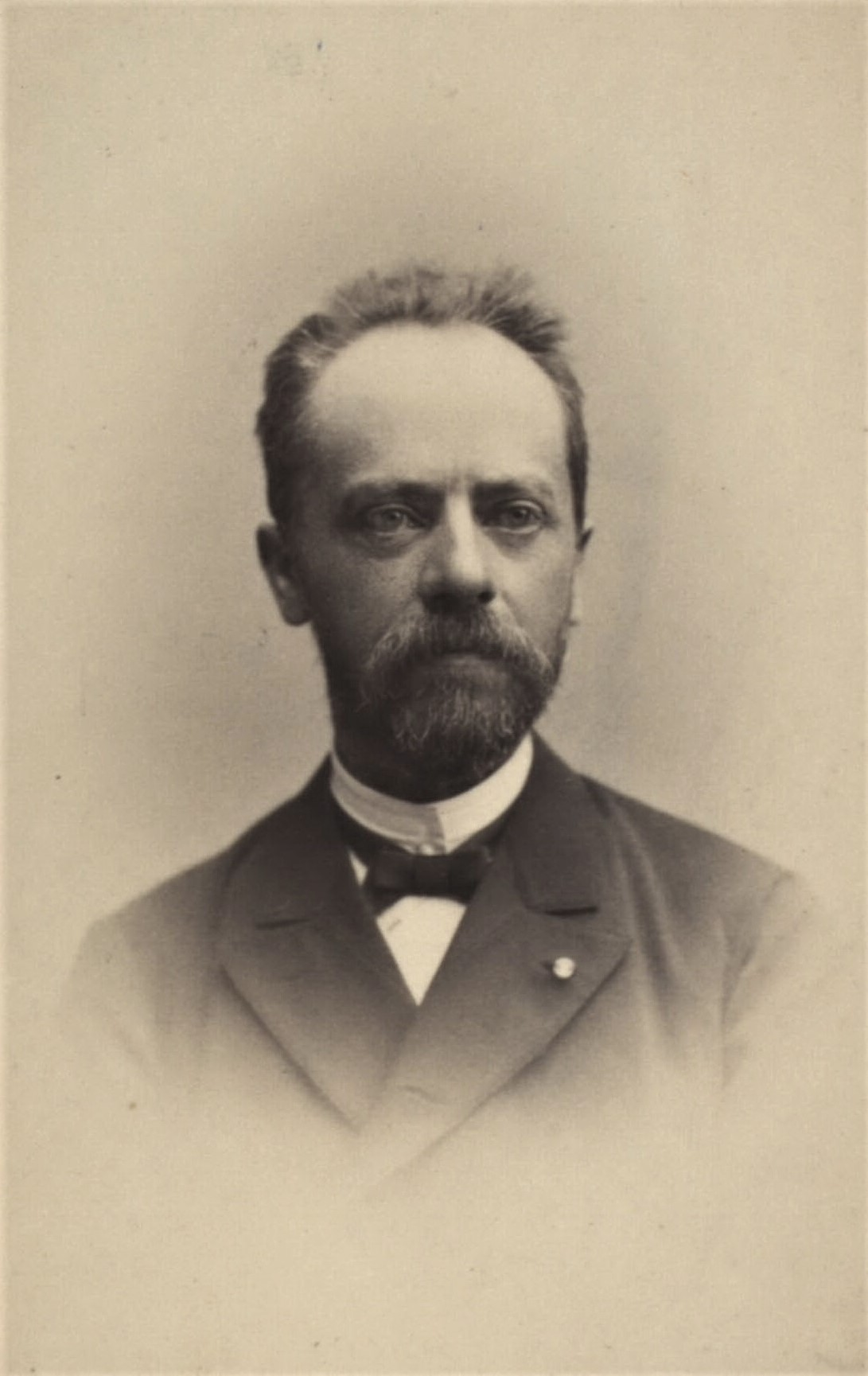 Lorentz Høyer Buchwaldt (1841–1933), amtmand på Færøerne.